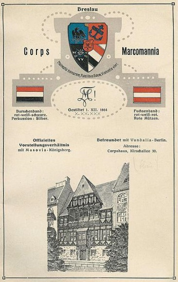 Wappen, Zirkel und Couleur des Corps Marcomannia Breslau